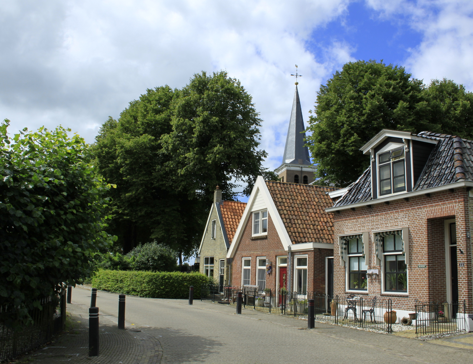 In het centrum van Rauwerd in de Gemeente Boornsterhem in Friesland. De officiële Friese naam is Raerd..